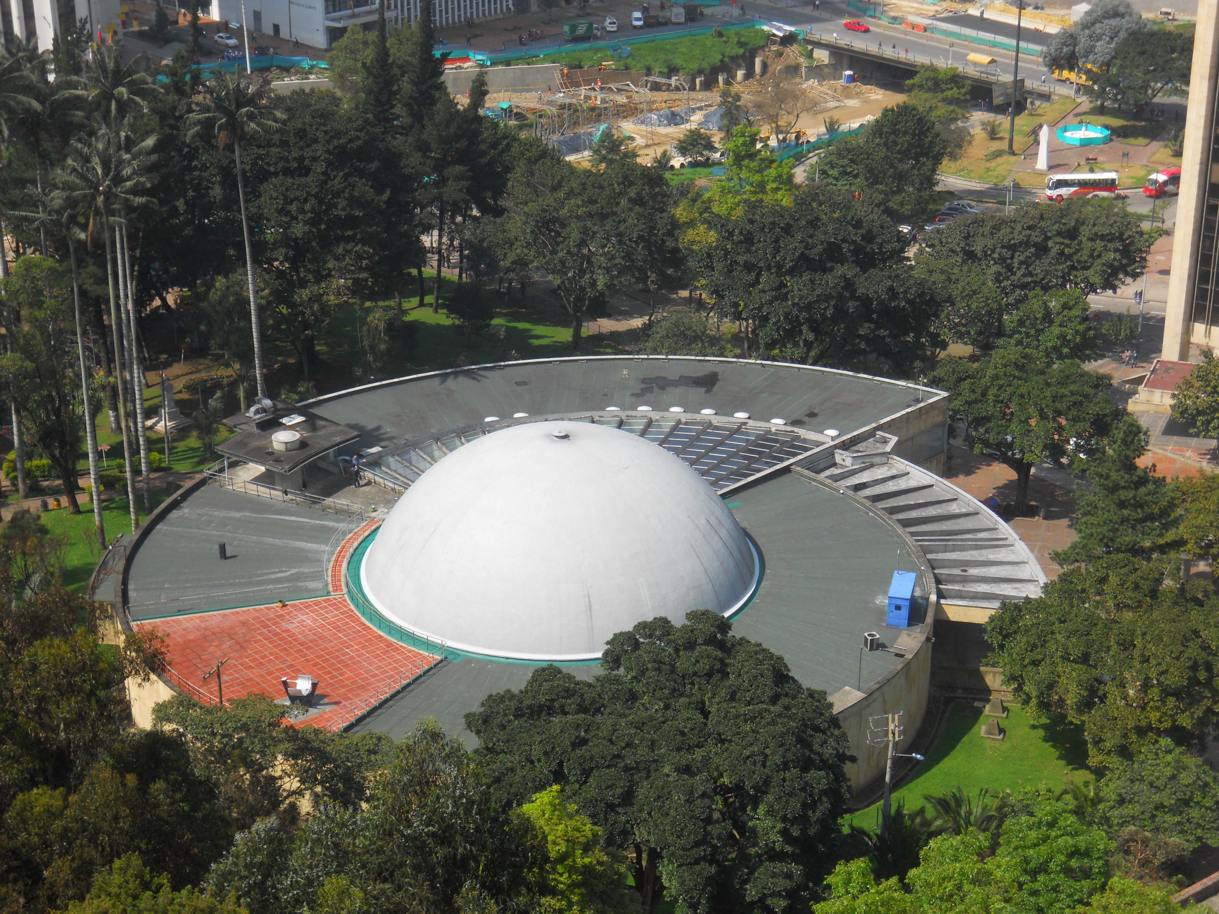 Planetario Distrital de Bogotá